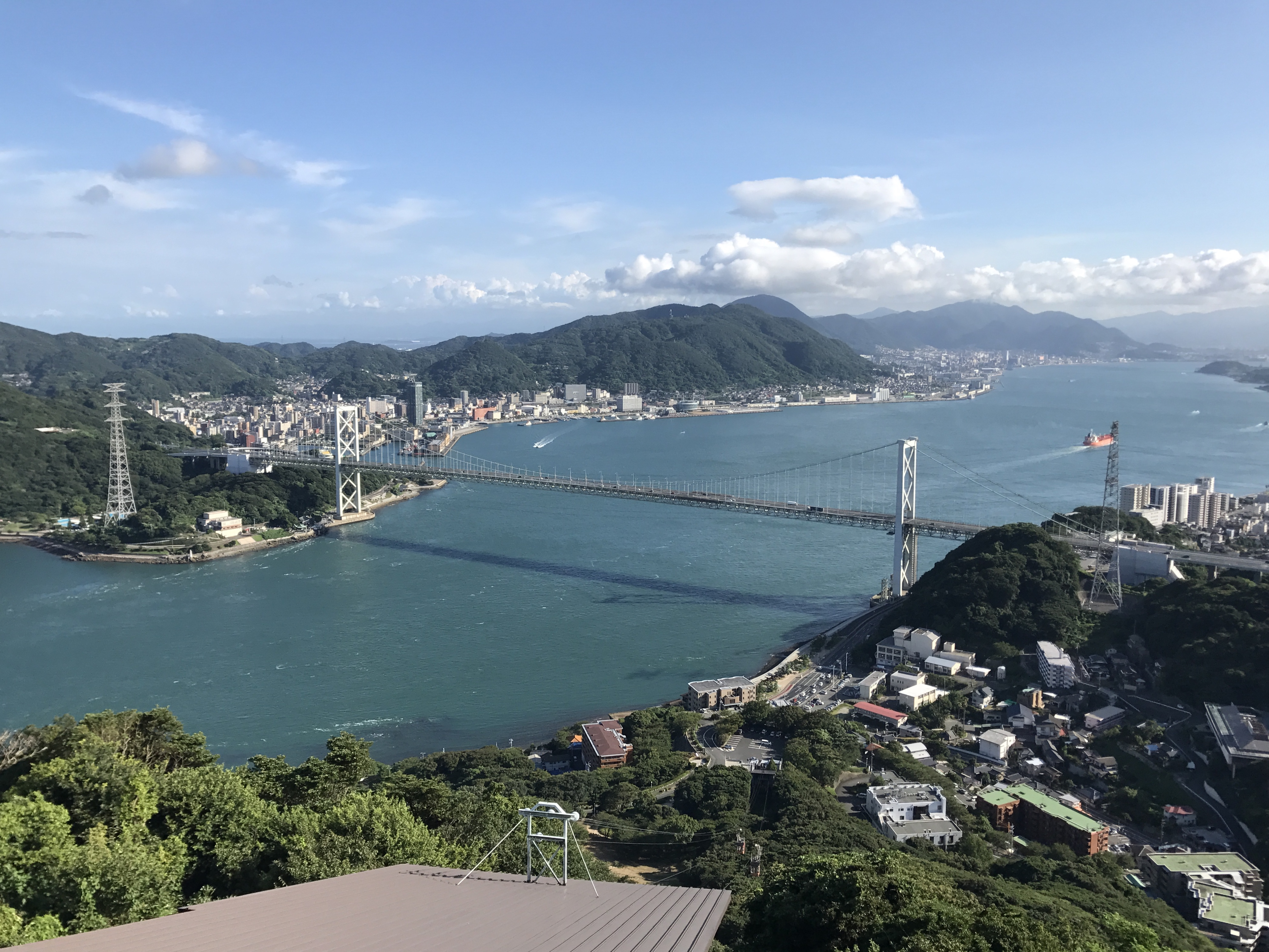 火の山ロープウェイ・火の山駅の屋上より望む関門海峡・関門橋方面